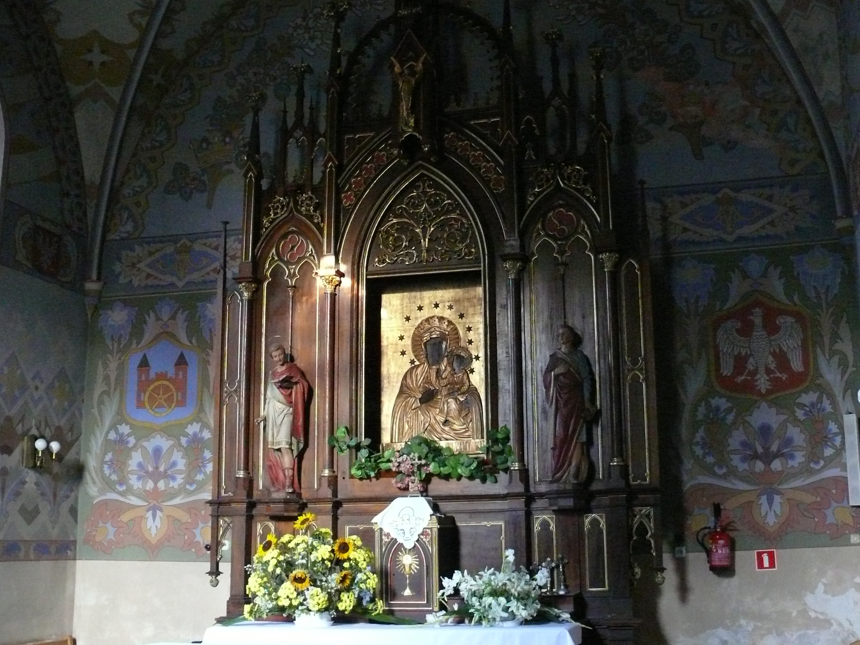 Kaplica MB Częstochowskiej w kolskiej farze